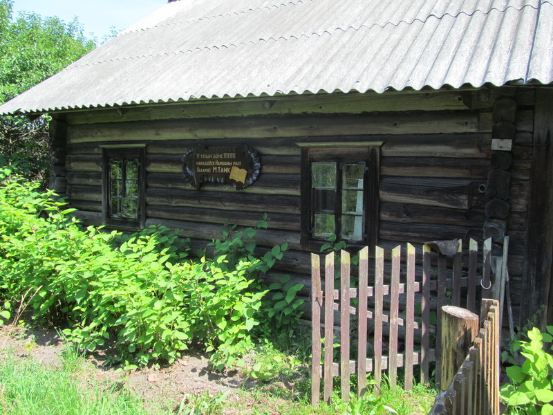 Пількаўшчына. Родная хата М.Танка, зараз яго музей